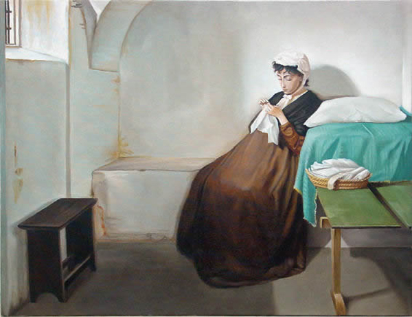 Luisa Sanfelice in carcere